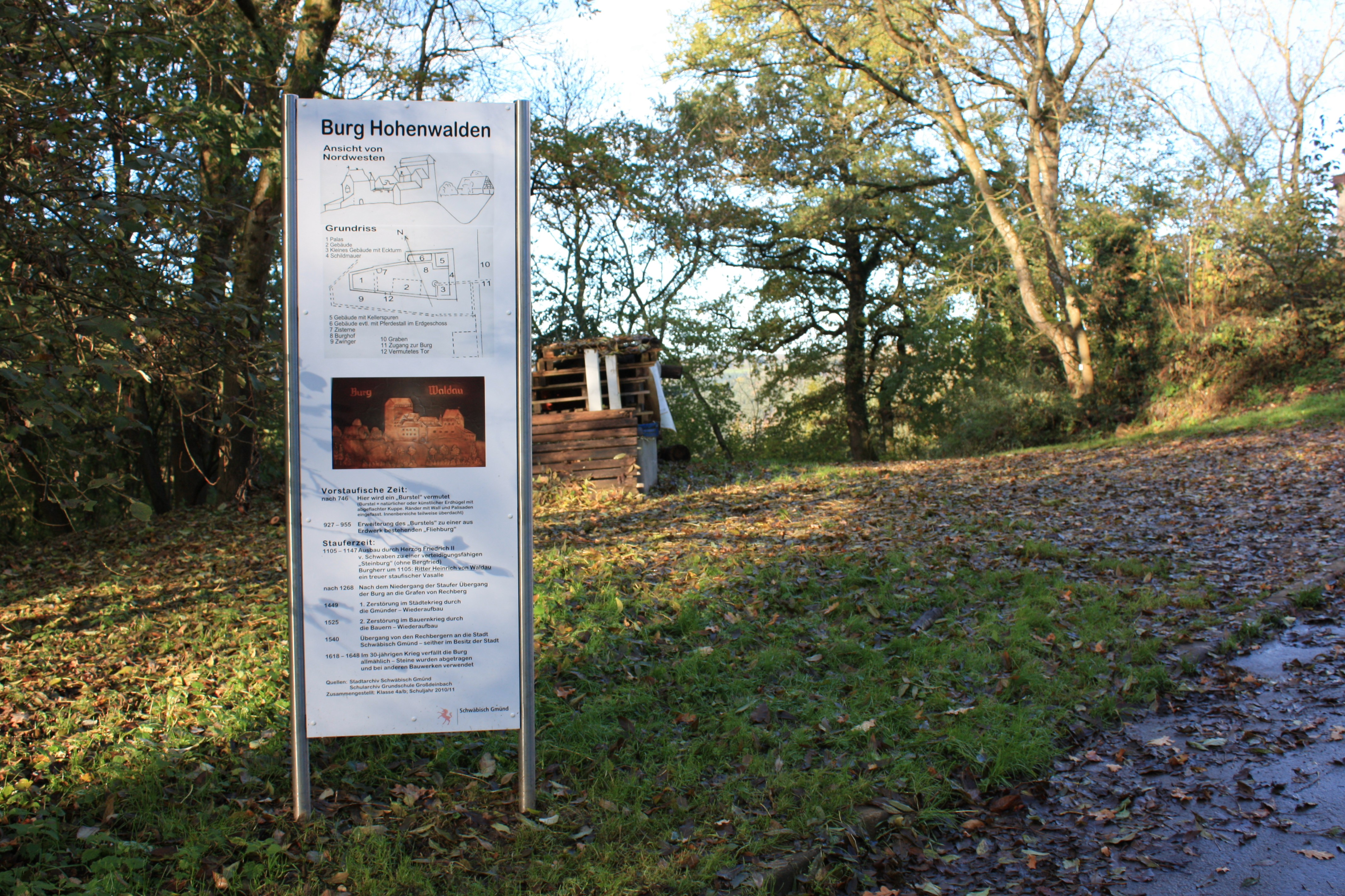 Burgstelle der Burgruine Waldau (Schwäbisch Gmünd). Infotafel mit Grundriss und Geschichte der abgegangenen Burg